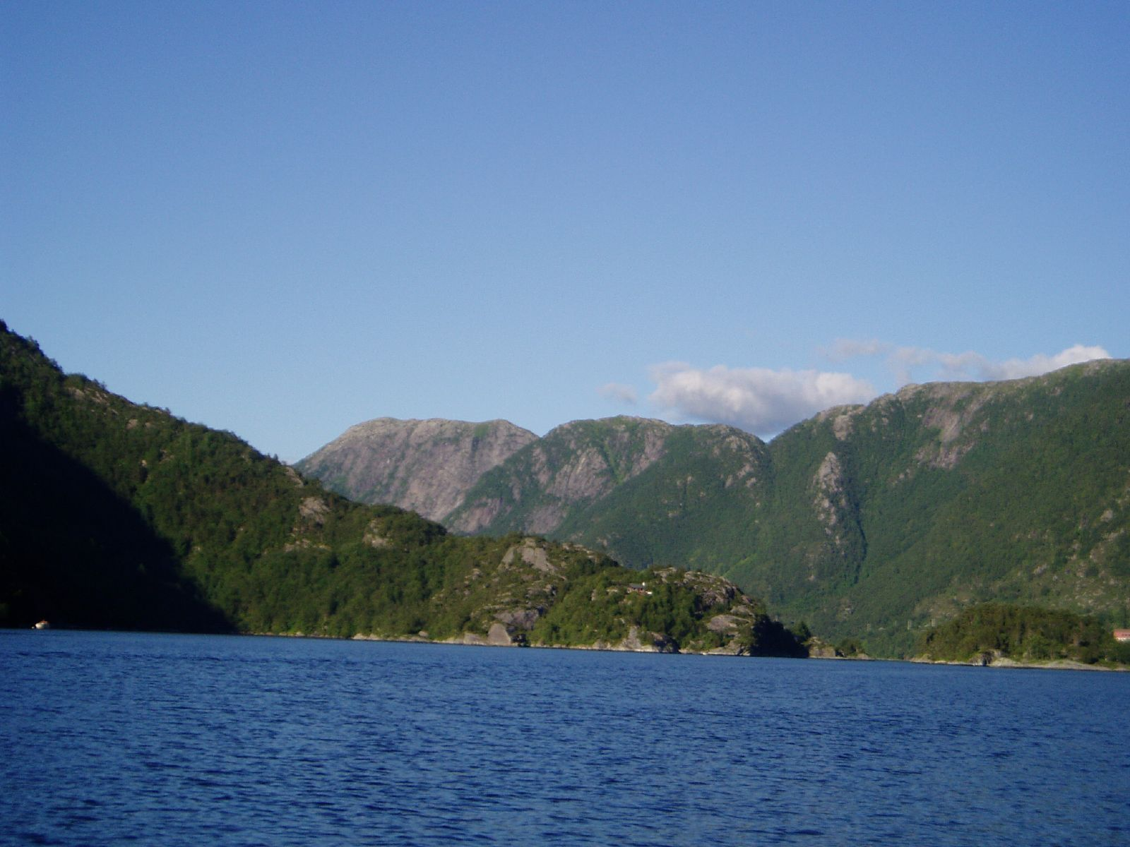 Austgulfjorden in Gulen, Sogn og Fjordane, Norway